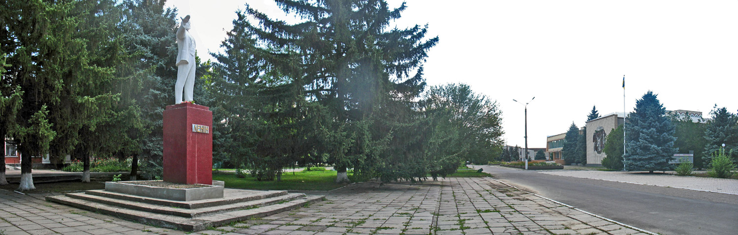 Lenin monument in Berezanka